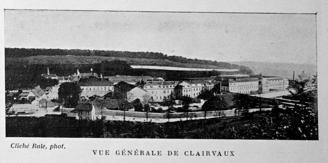 publié dans le "Bulletin de l'œuvre des voyages scolaires".